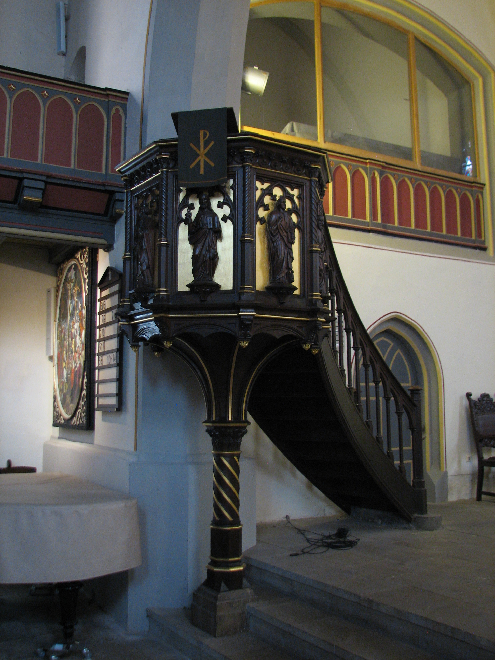 Die Kanzel